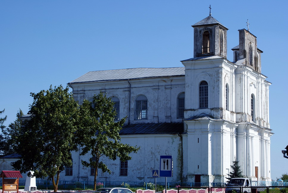 Беларуская (тарашкевіца): Сталавічы